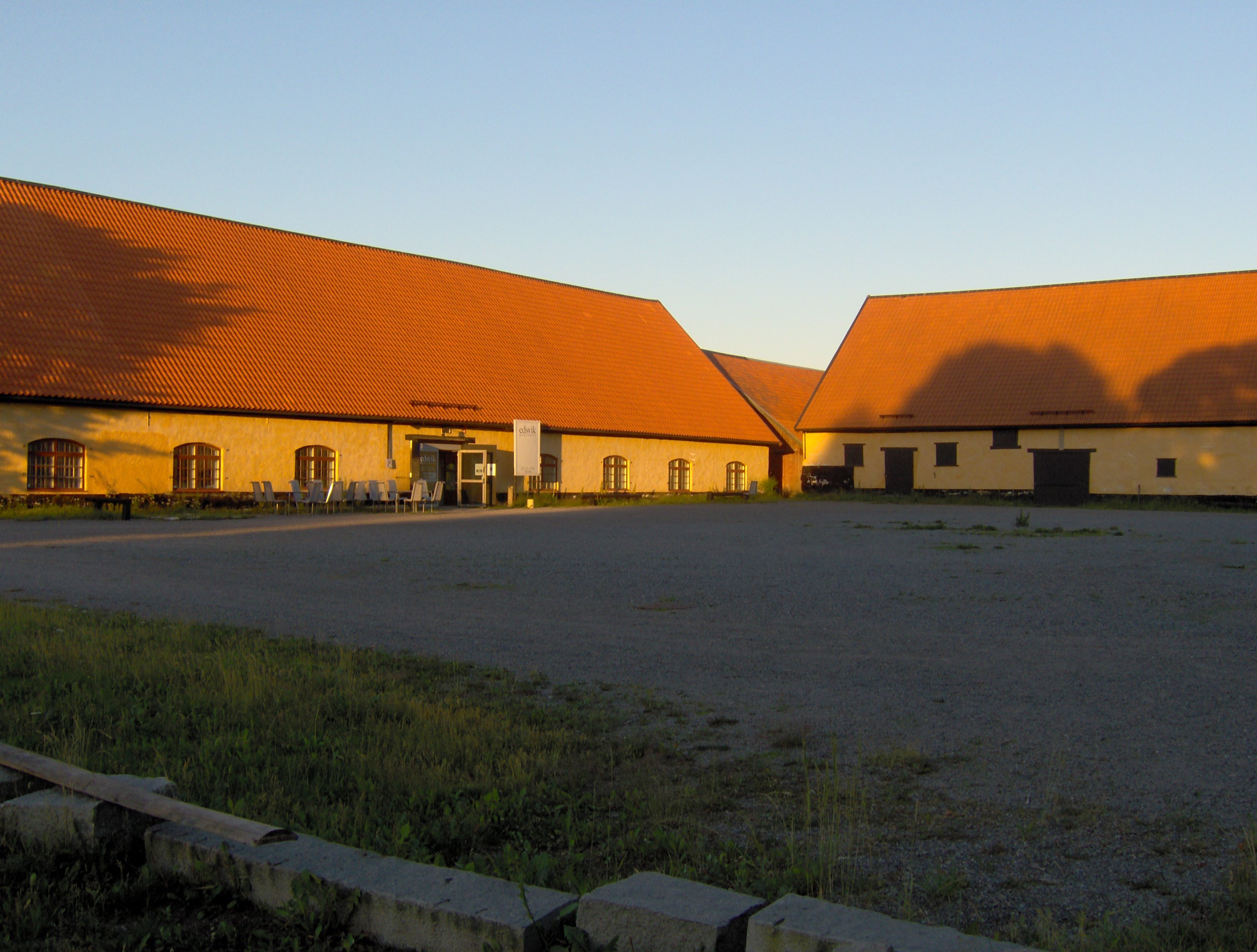 Photo of Stallbacken. Bild på Stallbackens konsthall.